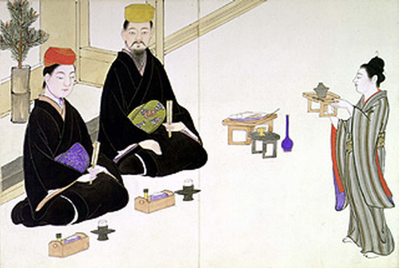 王府時代の国王から一般庶民までの姿